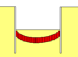 Plaatje van een bouwkuip met groutboog, getekend door Wikipediagebruiker: GeeKaa 24 aug 2005 09:31 (CEST)